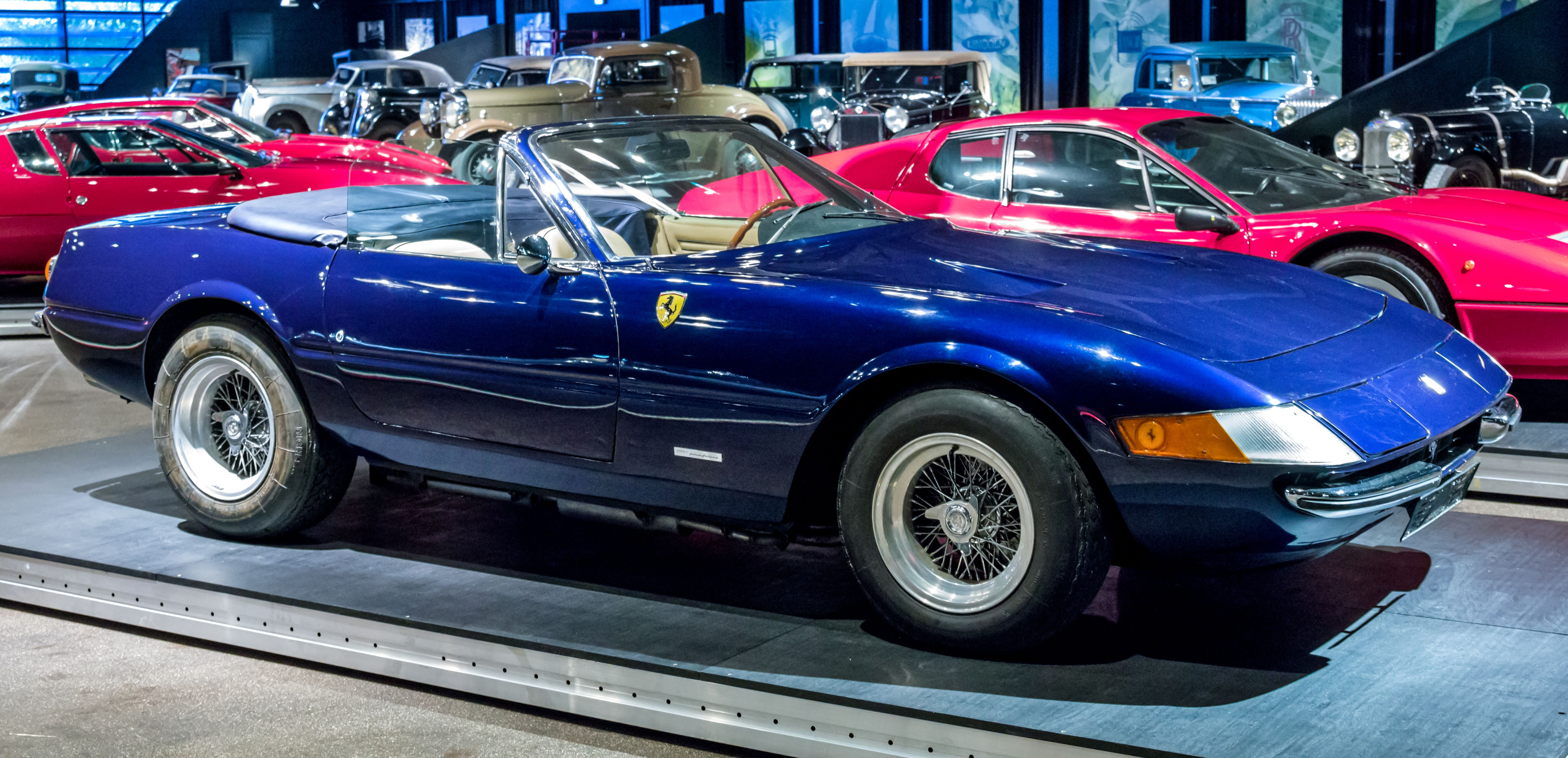 Das Volante Oldtimermuseum in Kirchzarten